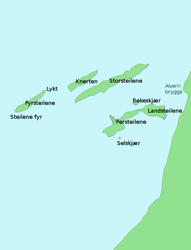 map of Steilene